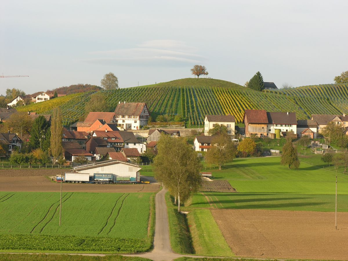 Switzerland, Canton of Schaffhausen, Dörflingen